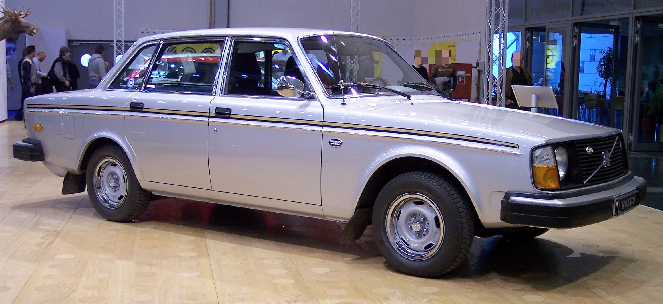 Volvo 244